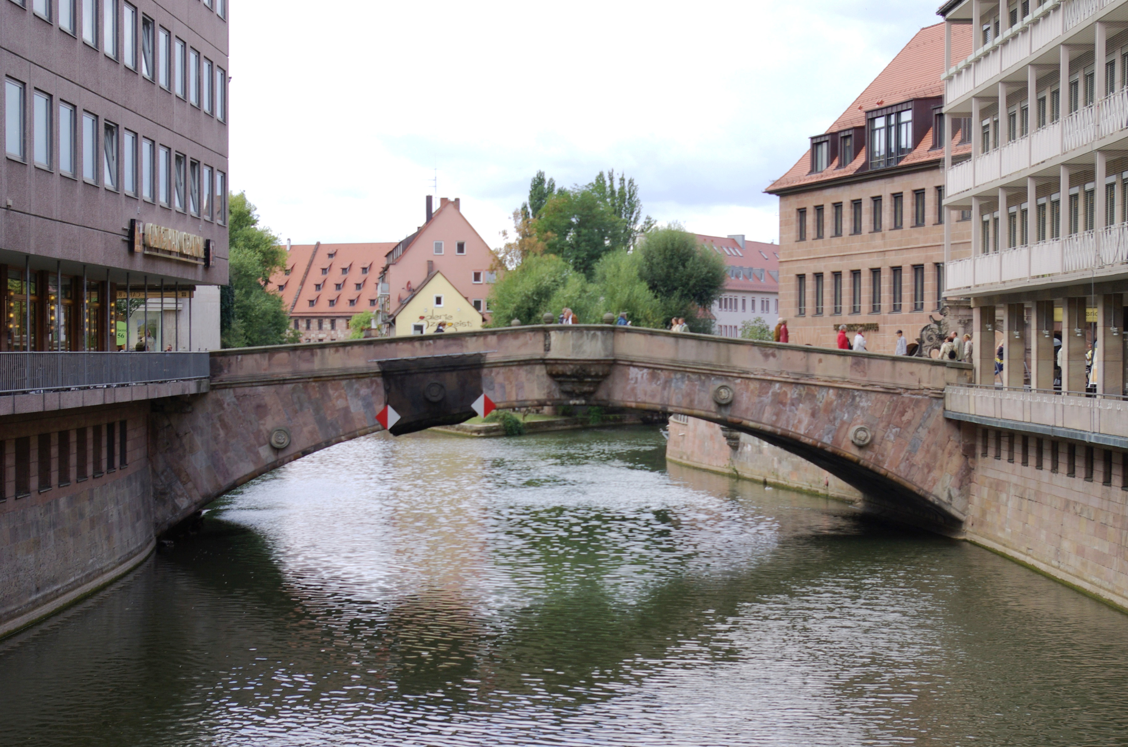 Fleischbrücke in Nürnberg, Blick von der Museumsbrücke nach Westen